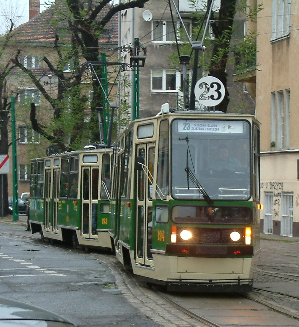 Konstal 105N in Poznań